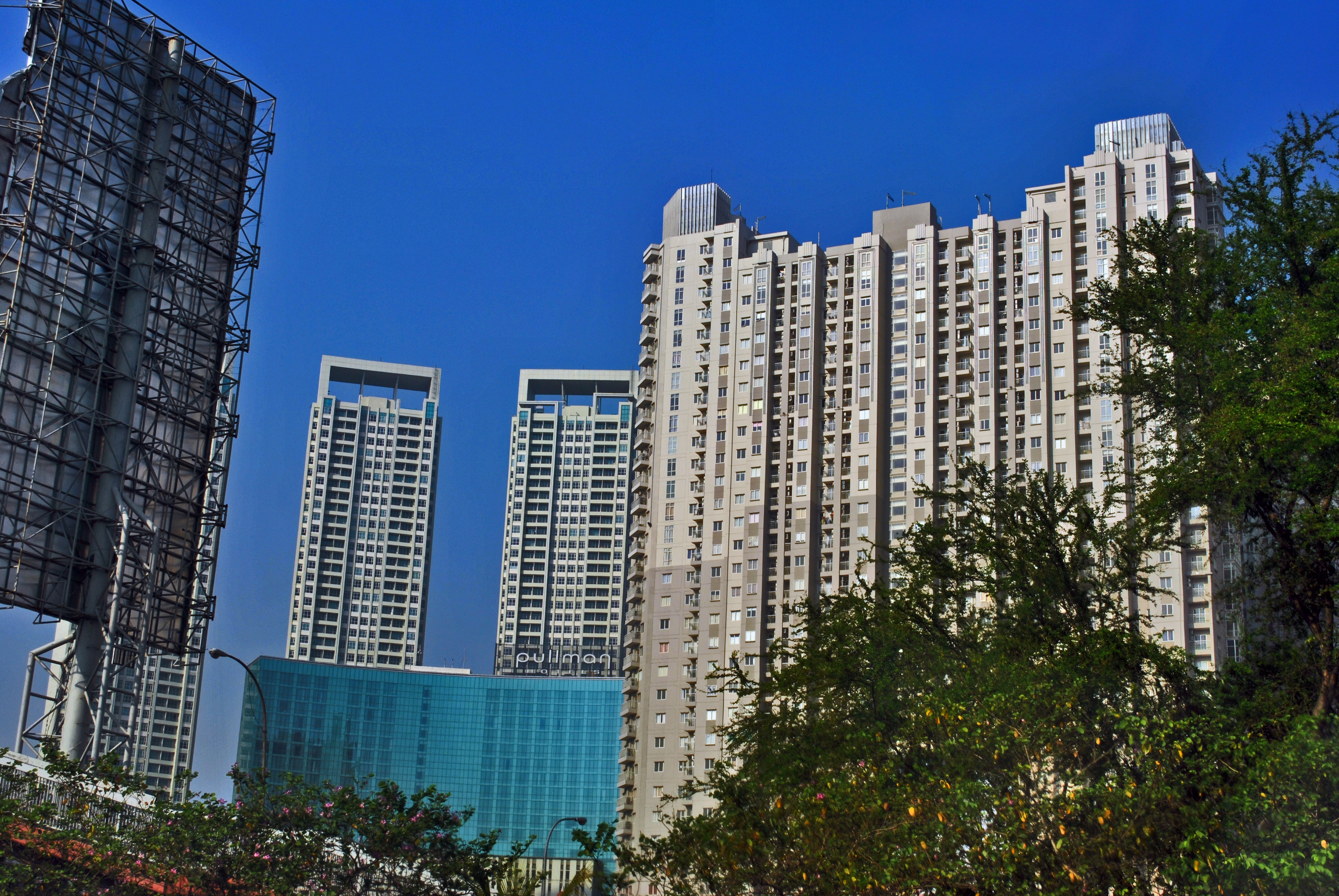 Podomoro City